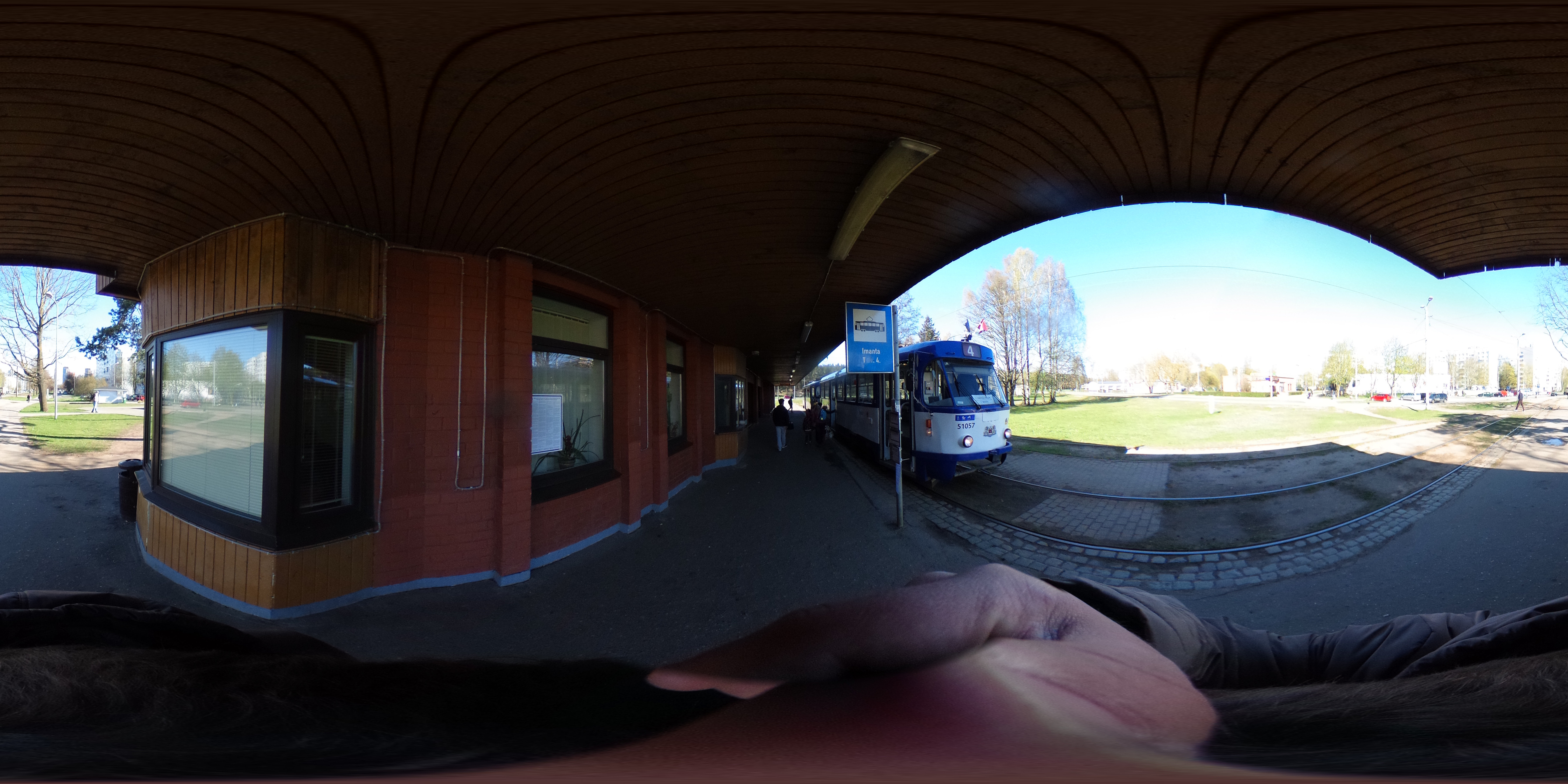 Riga tram Tatra T3 51057 Imanta